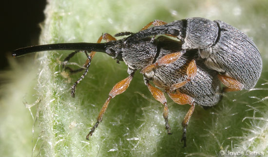 الشكل لحشرة السوس المذكرة و المؤنتة